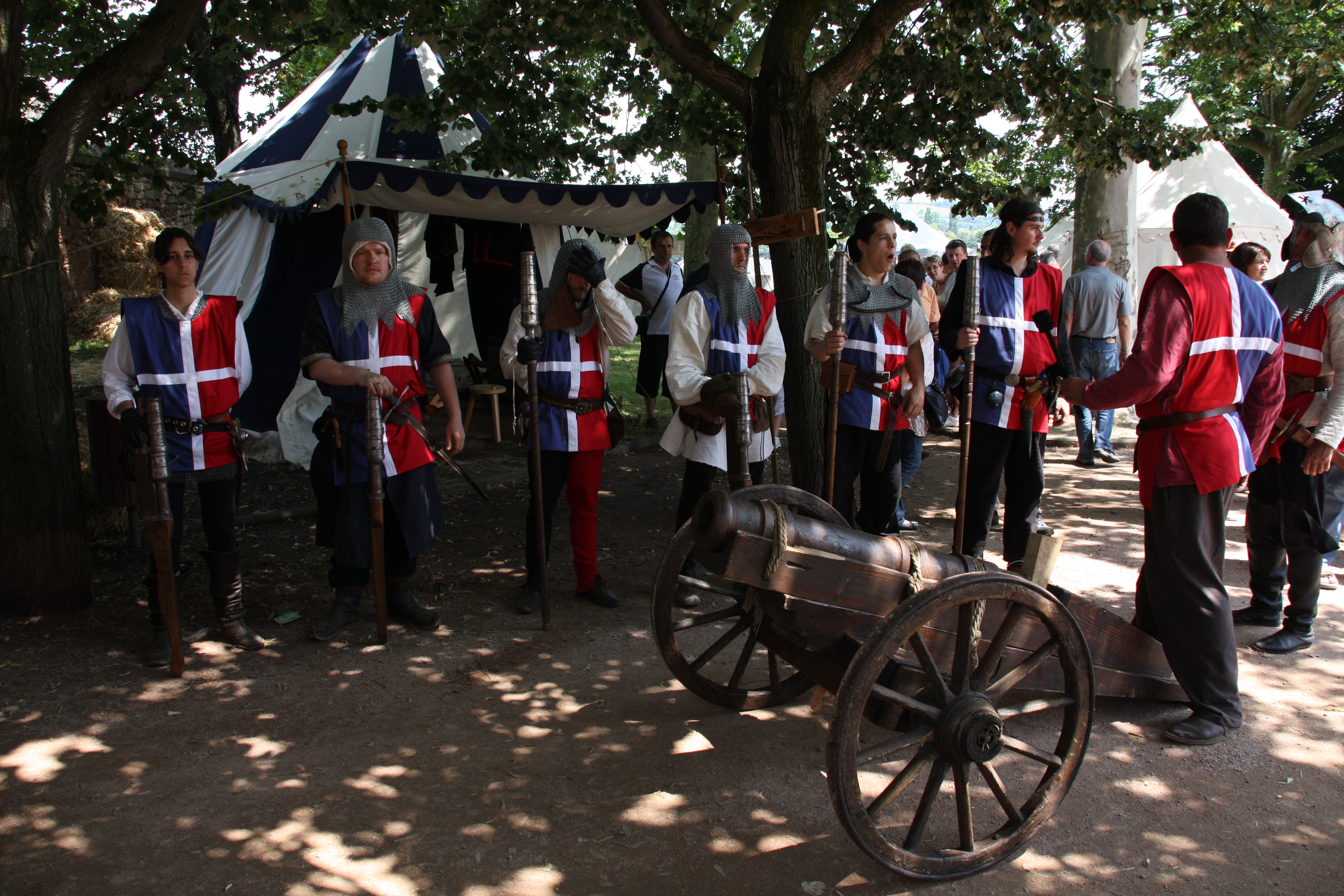 Démonstration de tir de canon Festival médiéval de Montluçon Personality rights warning This work depicts one or more identifiable persons. The use of depictions of living or deceased persons may be restricted by laws regarding personality rights. The extent of these restrictions depends on jurisdiction. Personality rights restrictions apply independently of copyright. Before using this content, please ensure that the intended use does not infringe any personality rights under applicable laws. You are solely responsible for ensuring that you do not infringe someone else's personality rights. See our general disclaimer.